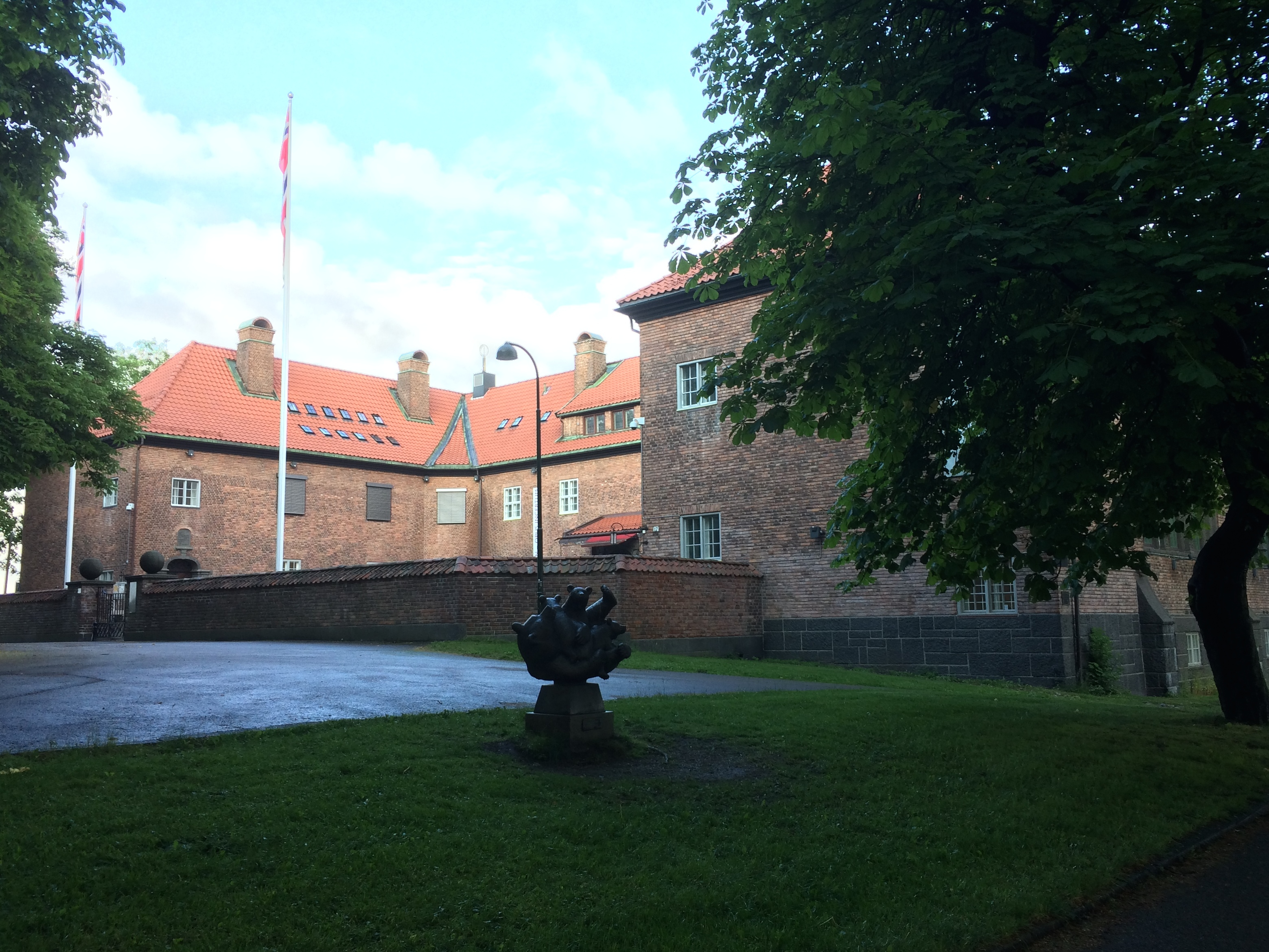 Haugar Vestfold Kunstmuseum i juni 2014. Bygningen ble bygd 1918–1921 som Tønsberg navigasjonsskole (Tønsberg sjømandsskole) på Haugar/Møllebakken i Tønsberg i Vestfold. Arkitekter: Andreas Bjercke og Georg Eliassen. Utsmykning: Tolv karyatider av Wilhelm Rasmussen 1920-1922.